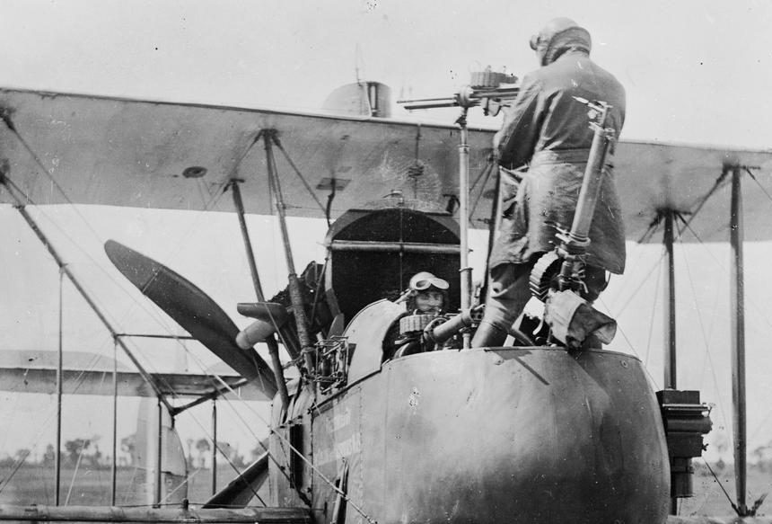 Ametralladoras Lewis montadas en un avión británico F.E.2d